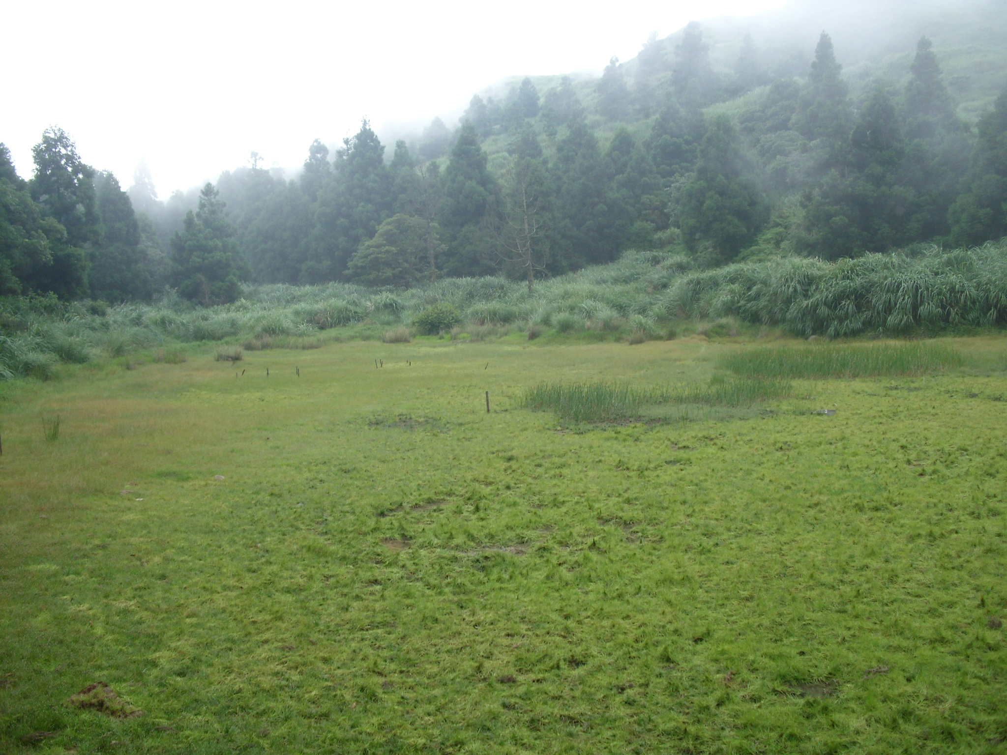 中文（台灣）: 前面整片青綠色伏倒的台灣水韭(Isoetes taiwanensis)。